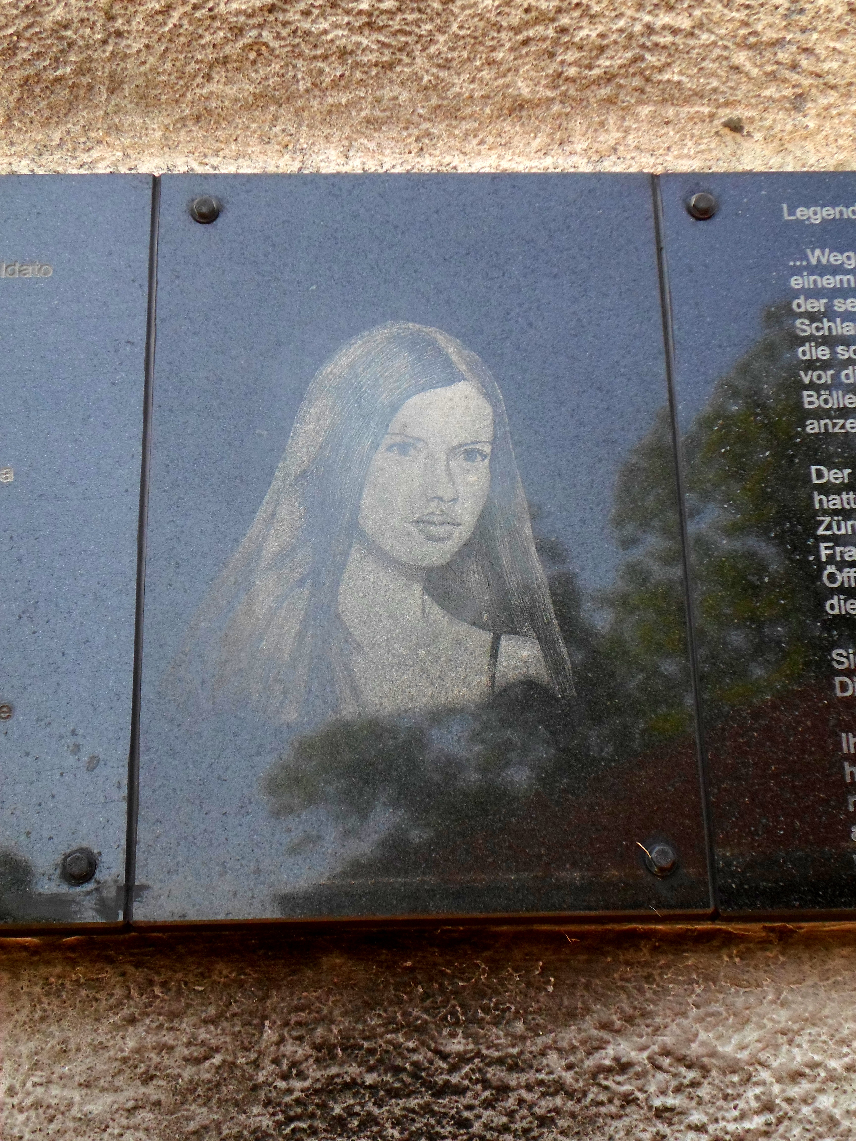 Srpski (latinica): Banjalučka Julija-Safikada, Safikadin grob Сликава е подигната во рамките на проектот „По трагата на душата 2015“.